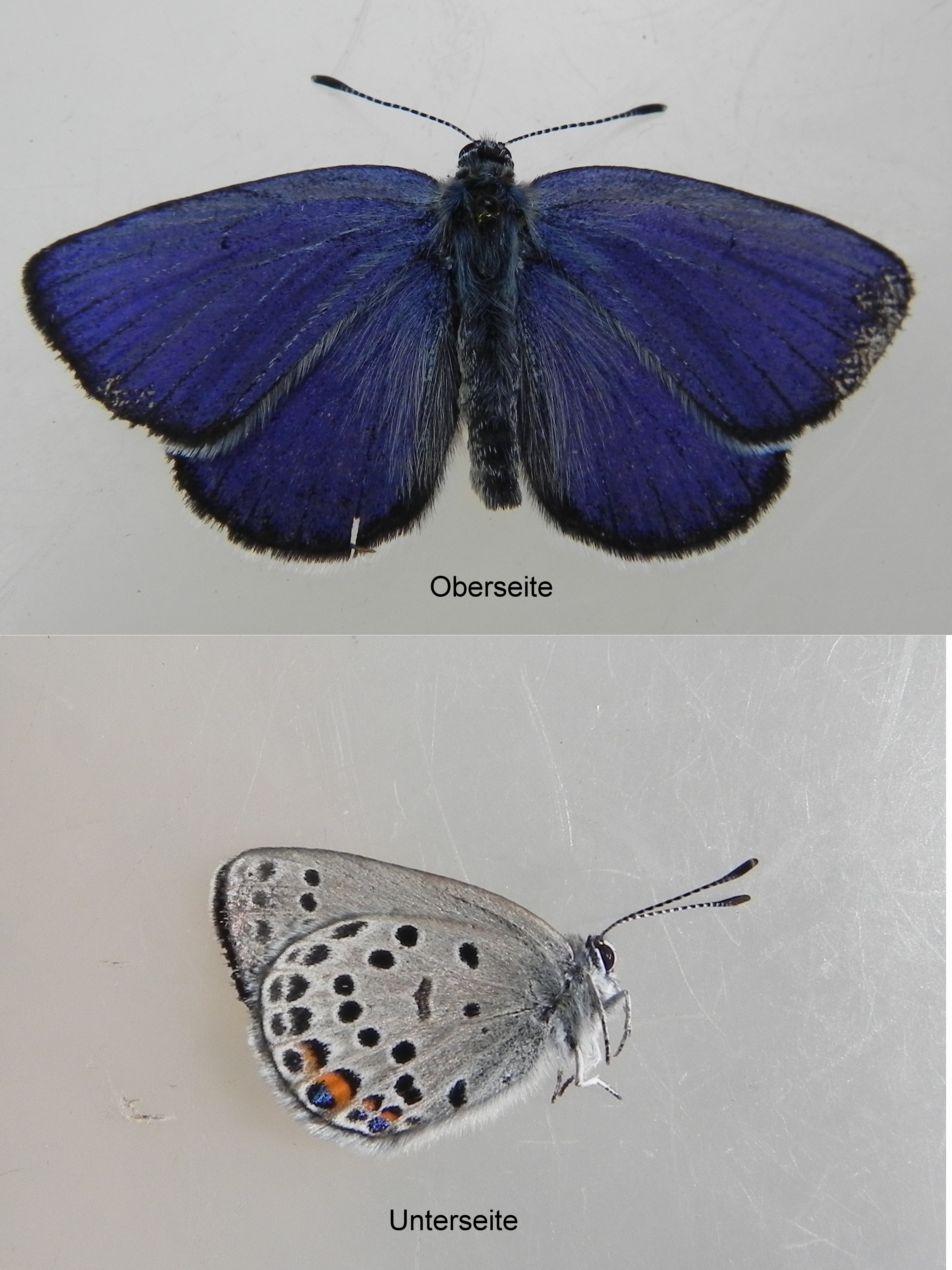 Hochmoor-Bläuling (Plebejus optilete), (Männchen) im Naturpark Südheide (Ober- und Unterseite)